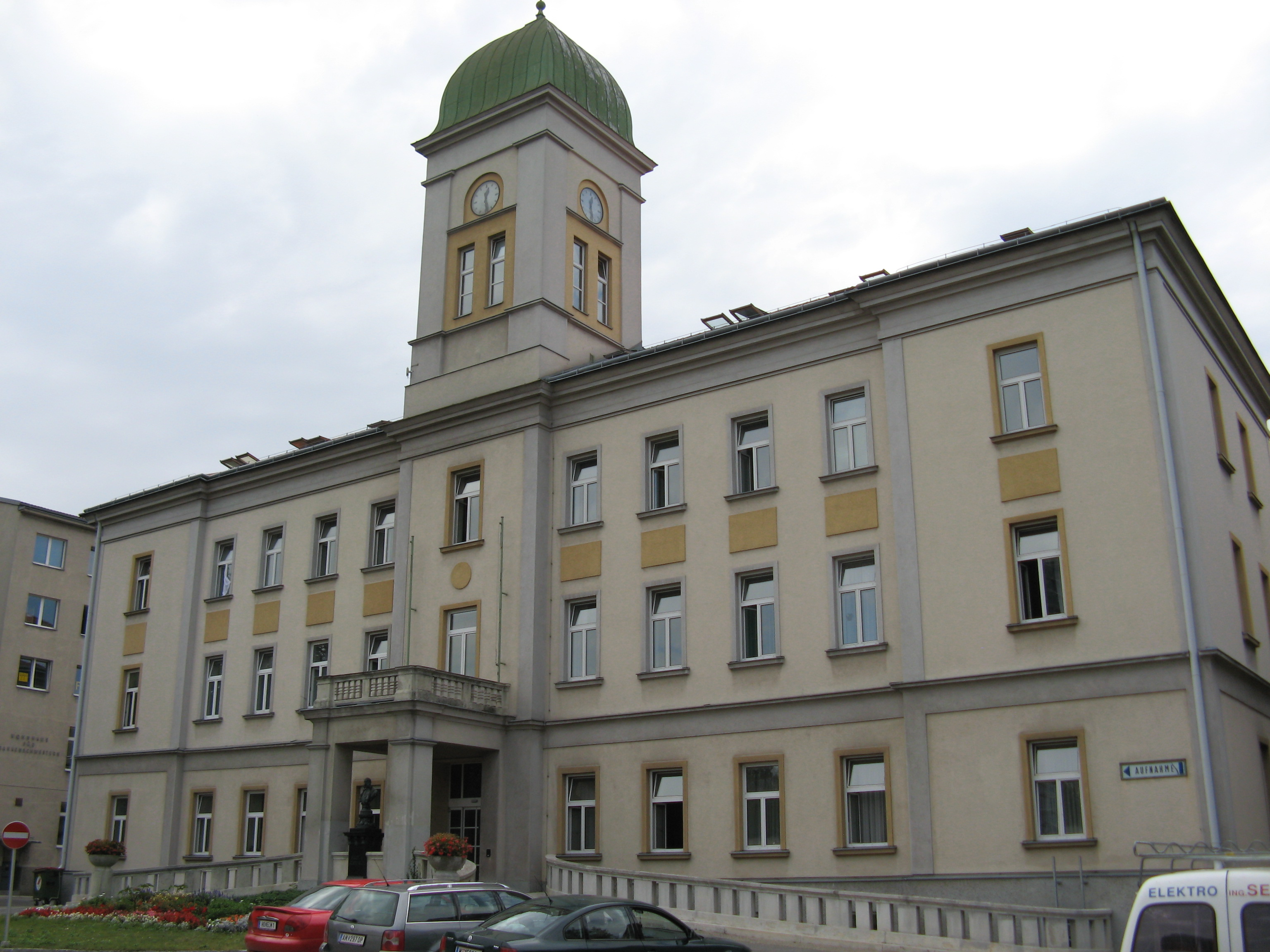 Kaiser Franz Joseph Spital (1887-92) in Wien-Favoriten, Direktionsgebäude